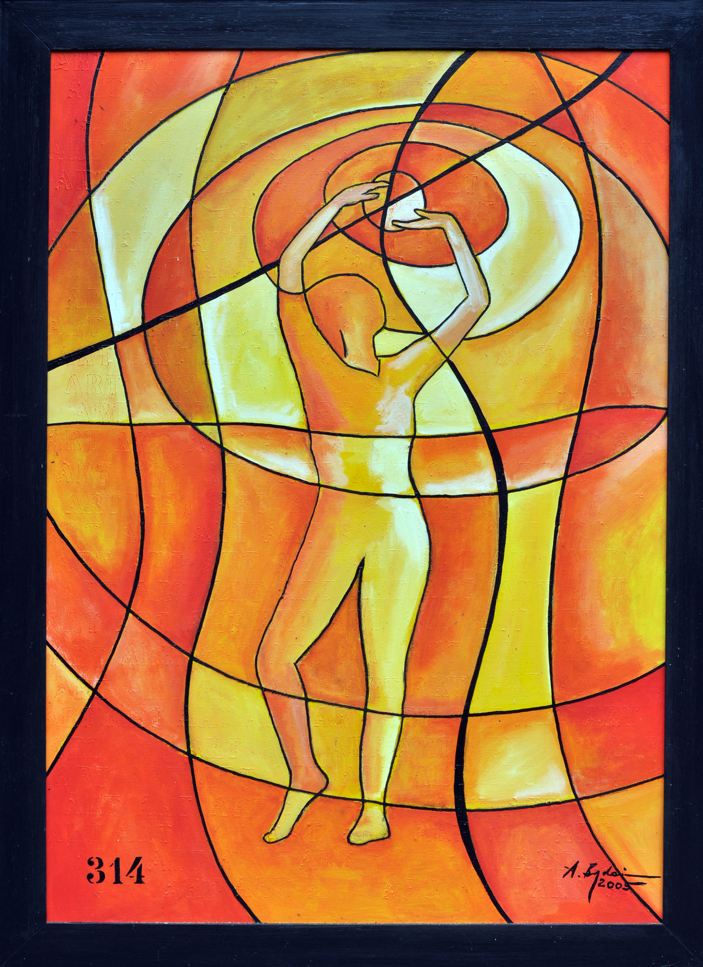 Gemälde "Balance 2" von Andreas Bogdain; Öl auf Leinwand; ca. 70 x 100 cm